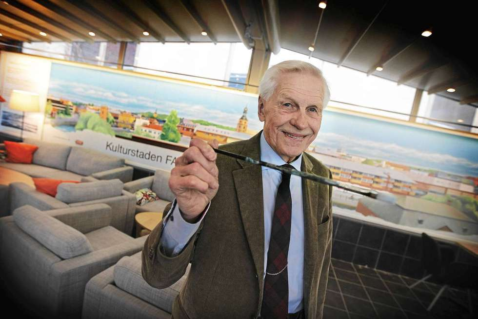 Arkitekten Jack Hanson utsedd till Årets Formbärare 2017 av Svensk form